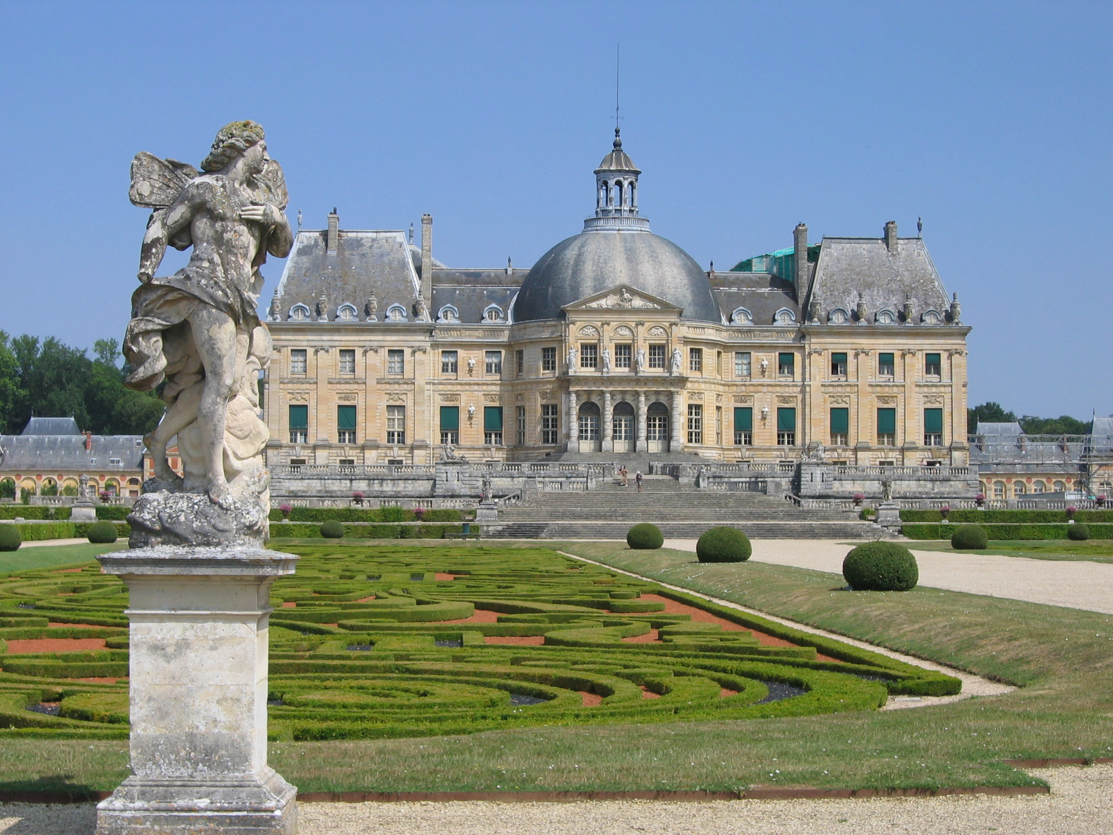 Parterre garden at Château de Vaux-le-Vicomte.